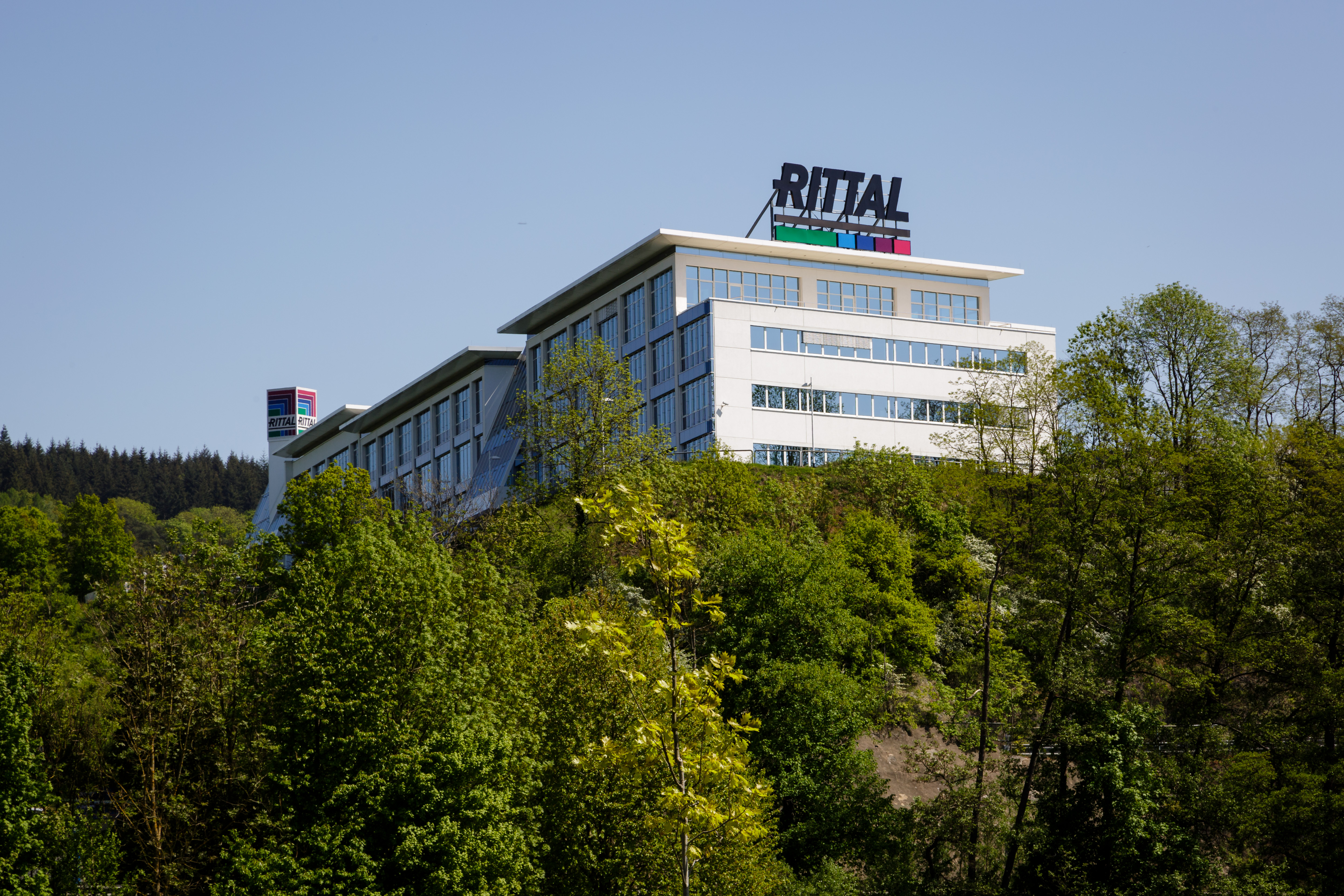 Rittal, größter Arbeitgeber in Herborn